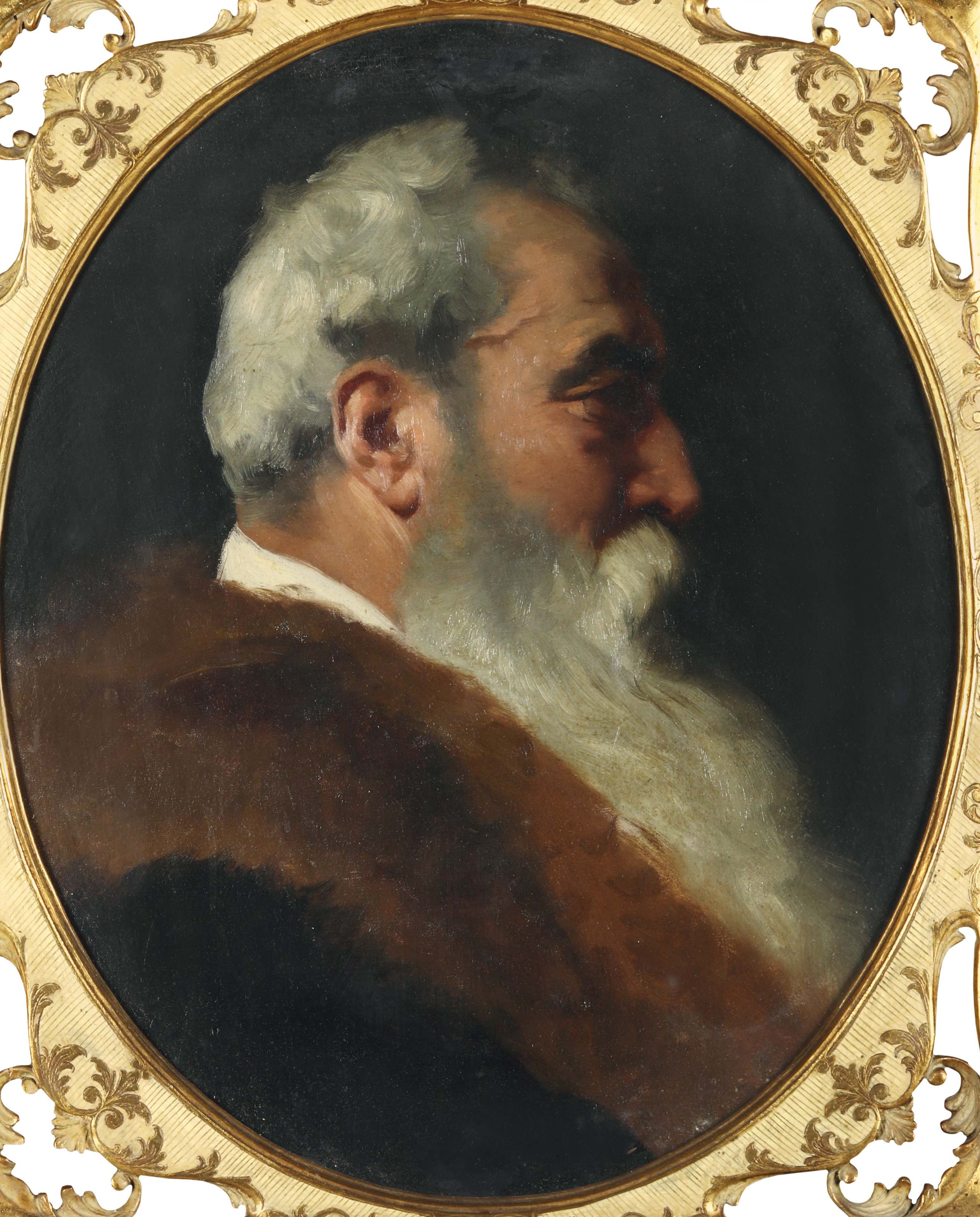 Opera inserita nel catalogo generale dell'opera di N.Barabino.